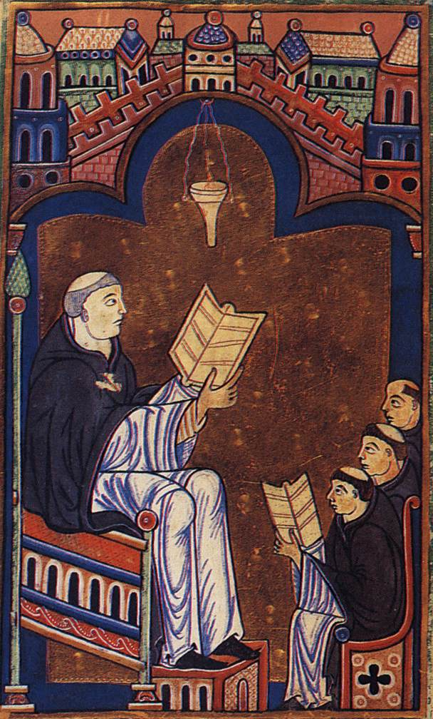 Hugo von Sankt Viktor beim Unterricht in seiner Klosterschule in Paris; Darstellung aus einem von Hugos Werken; Die Handschrift befindet sich heute in der Universitätsbibliothek Oxford, England.